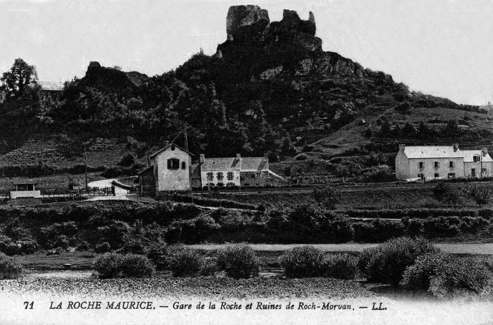 Carte postale du début des années 1900, montrant une photo avec la gare de la Roche et son ancien bâtiment du garde barrière. On aperçoit l'appentis servant de salle d'attente. En arrière plan les ruines du château de Roch-Morvan sur son piton rocheux.